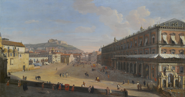 Napoli, Largo di Palazzo (attuale Piazza Plebiscito) prima della sua attuale sistemazione.